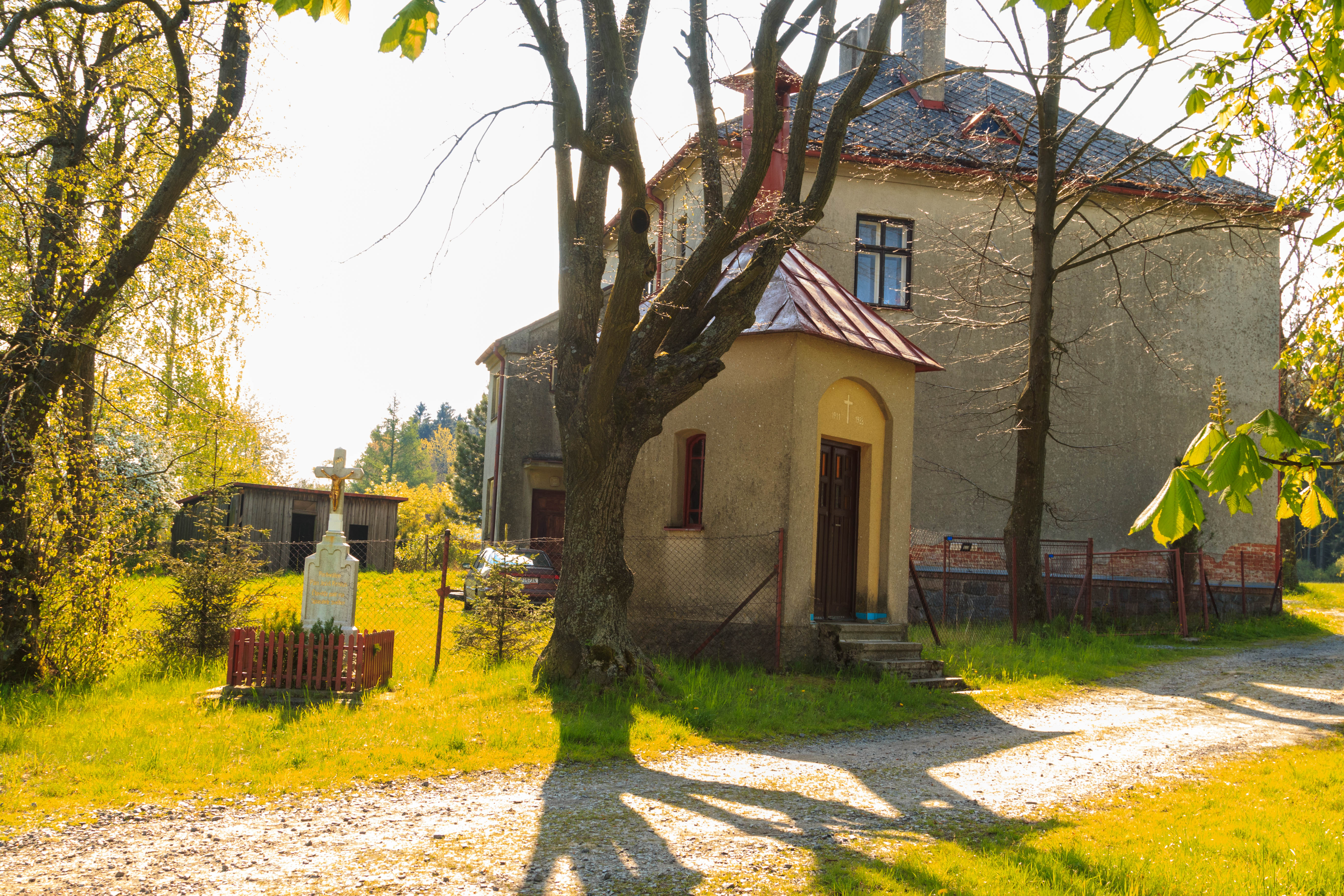 Čachnov kaplička